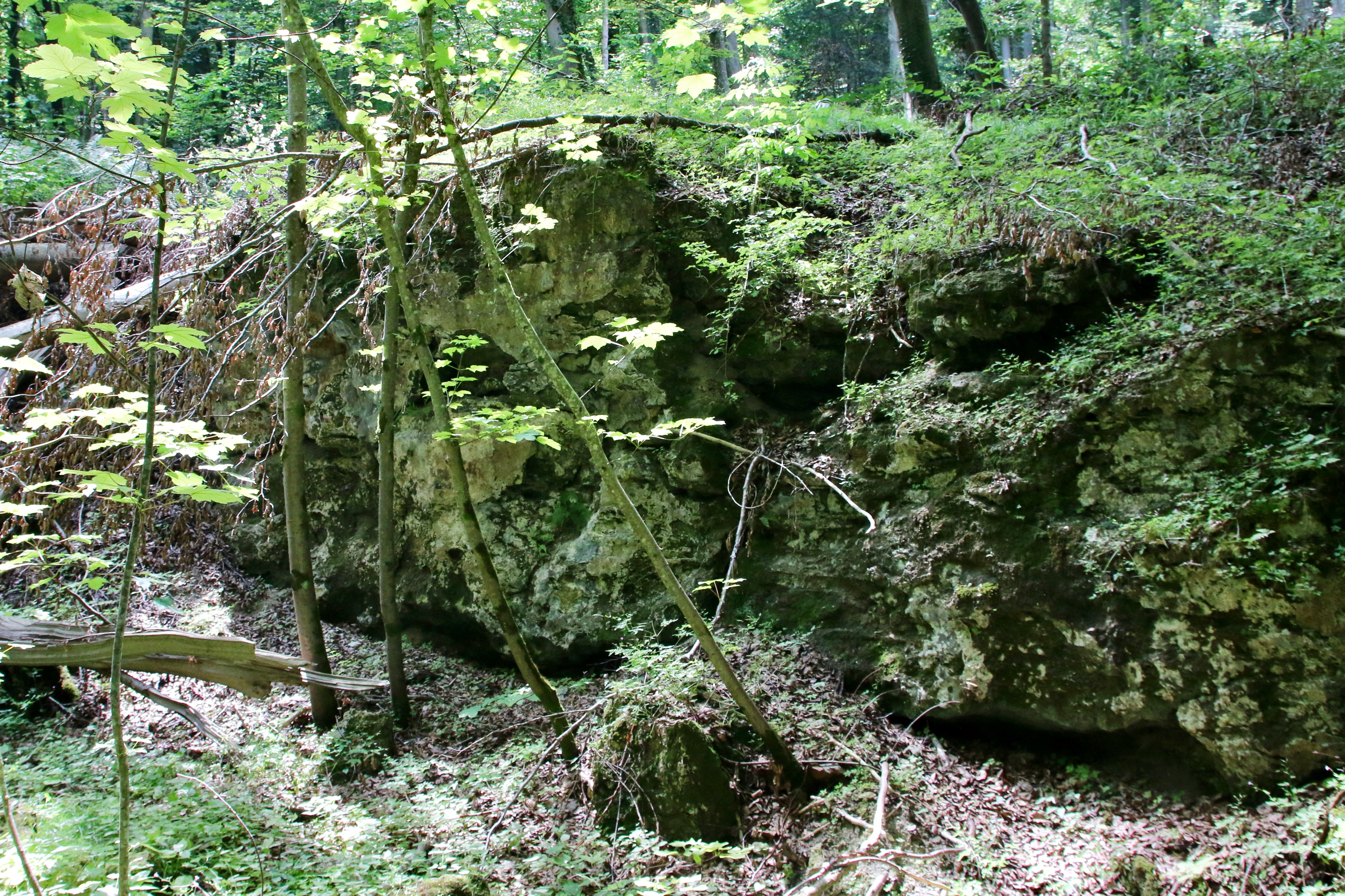 Die ehemaligen Kalktuffbrüche nordwestlich von Paterzell